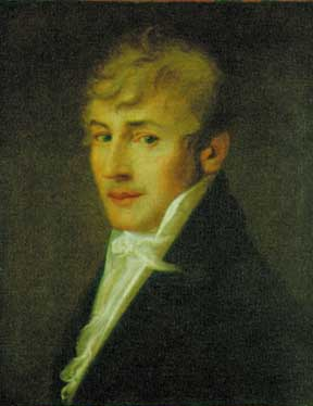 Партрэт хірурга Мацея Баранкевіча. 1807